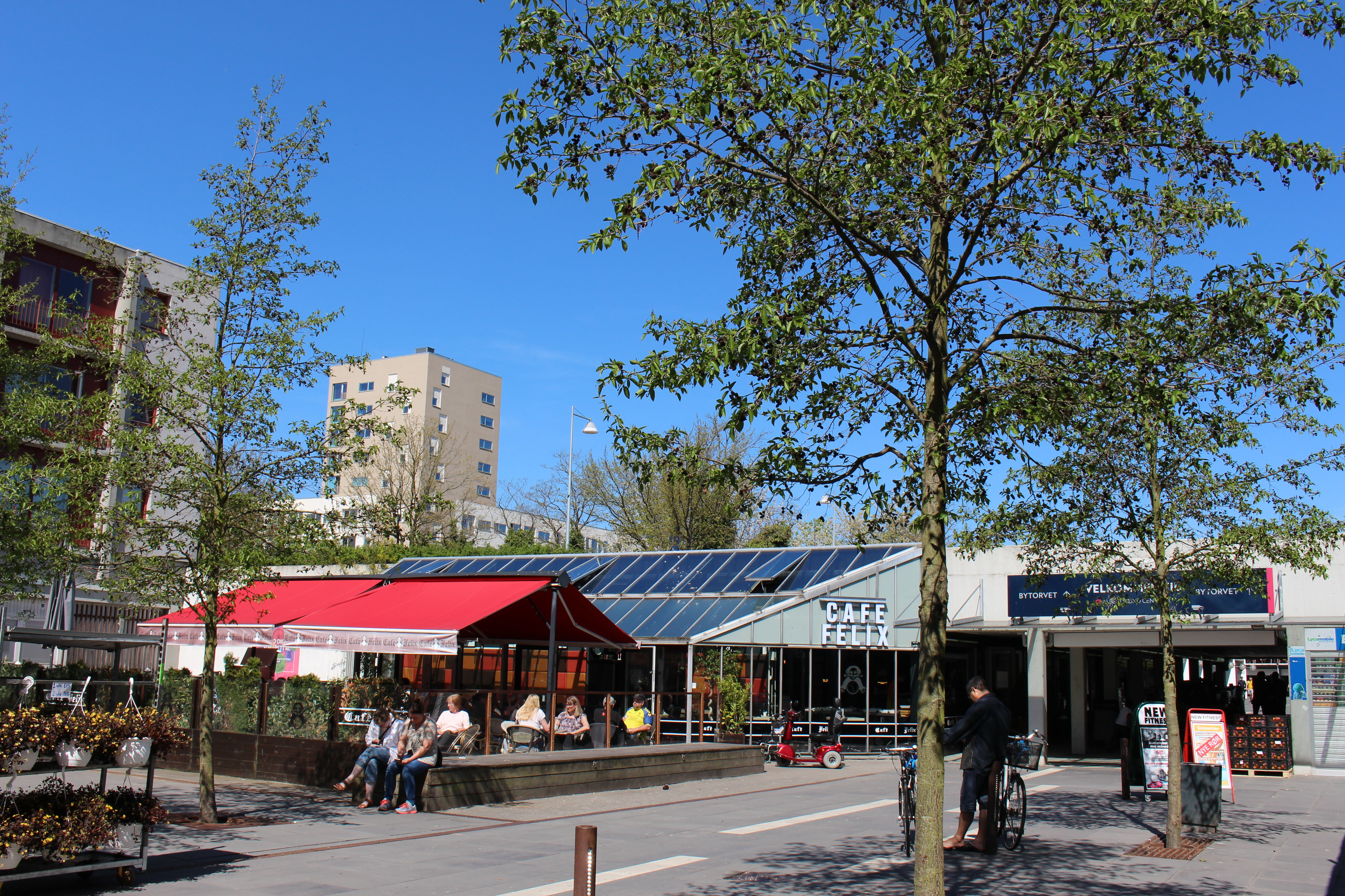 Albertslund Centrum ved Felix